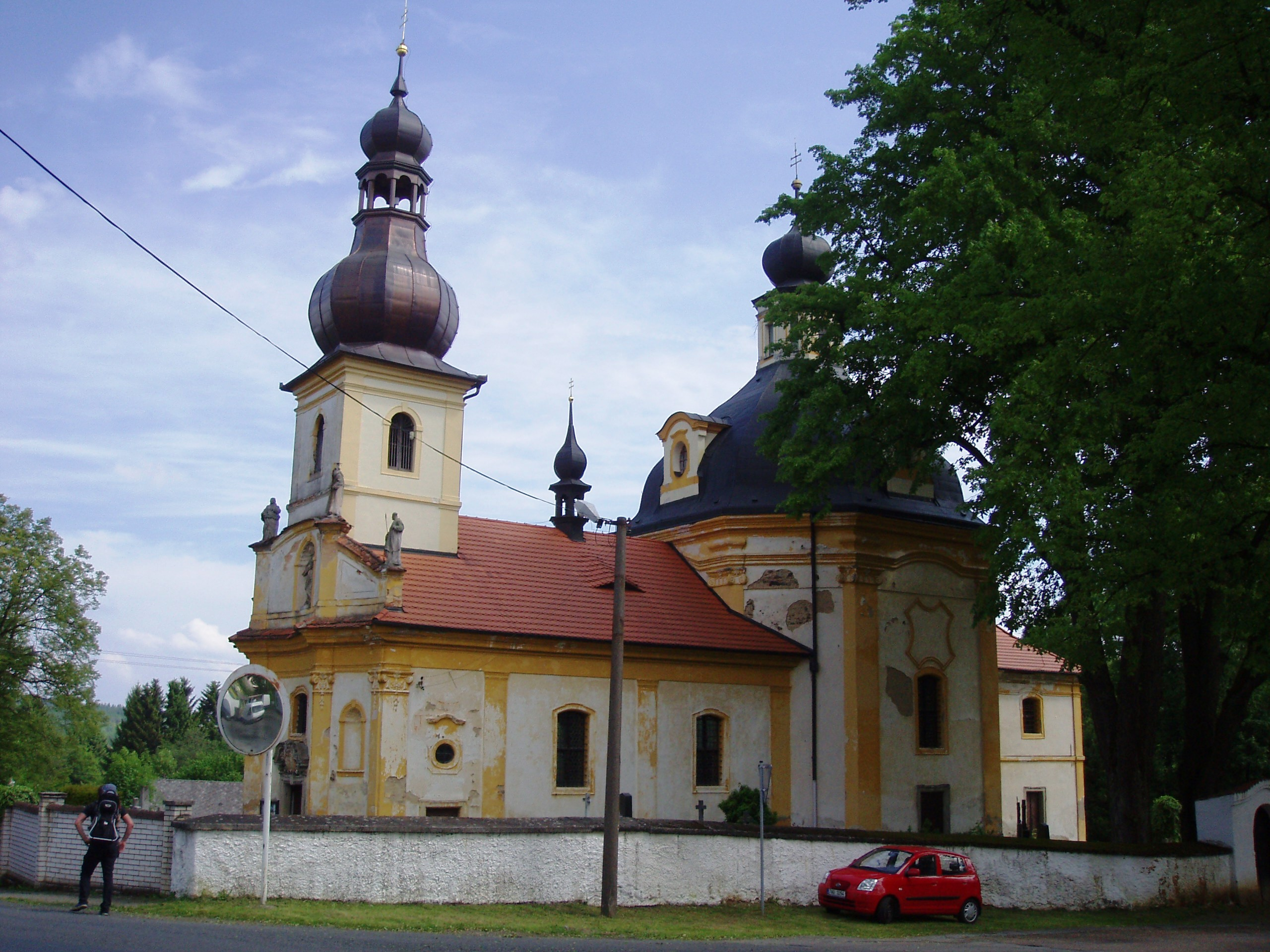 Kostel Sv.Jana Nepomuckého